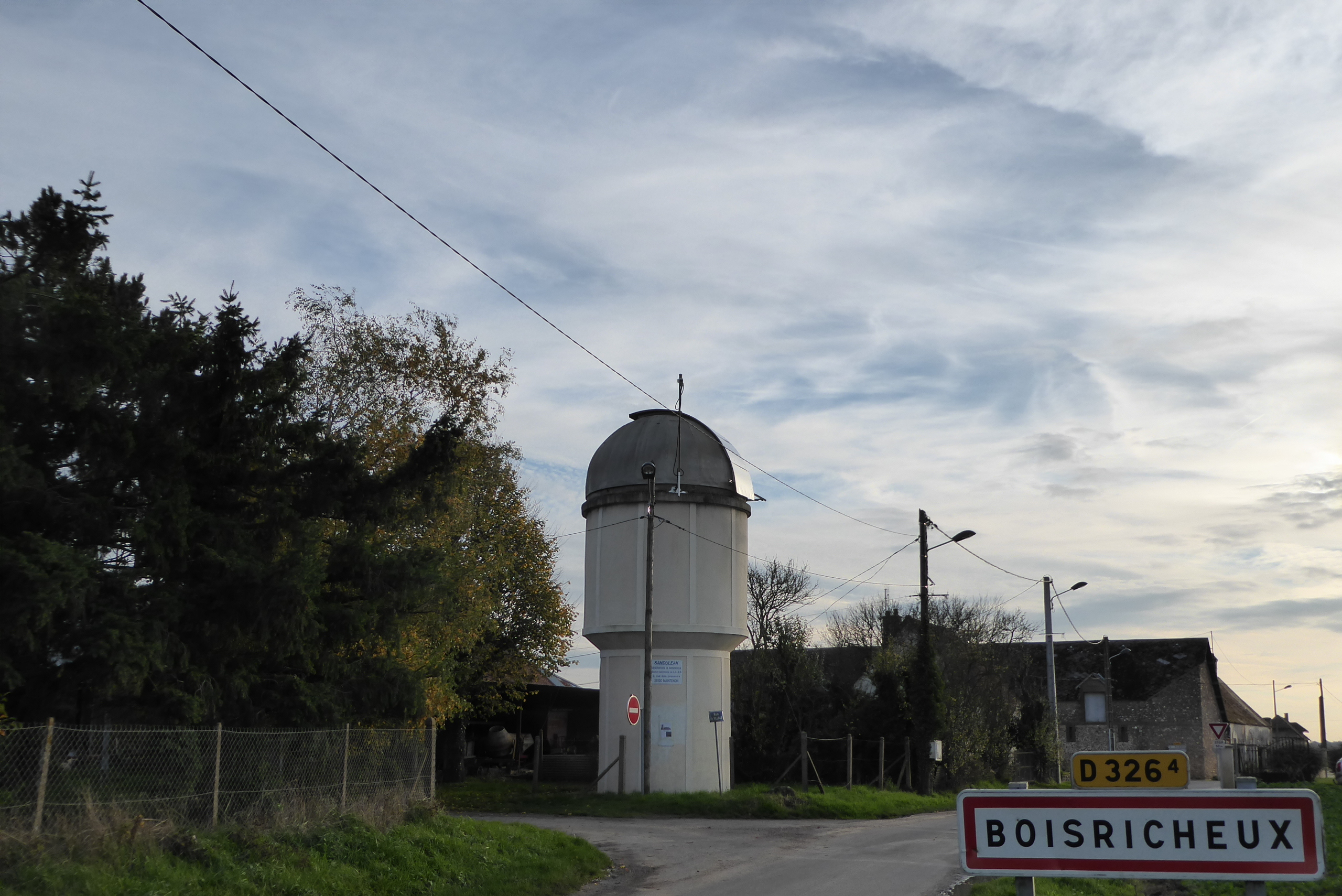 Observatoire de Boisricheux, Pierres, Eure-et-Loir (France).